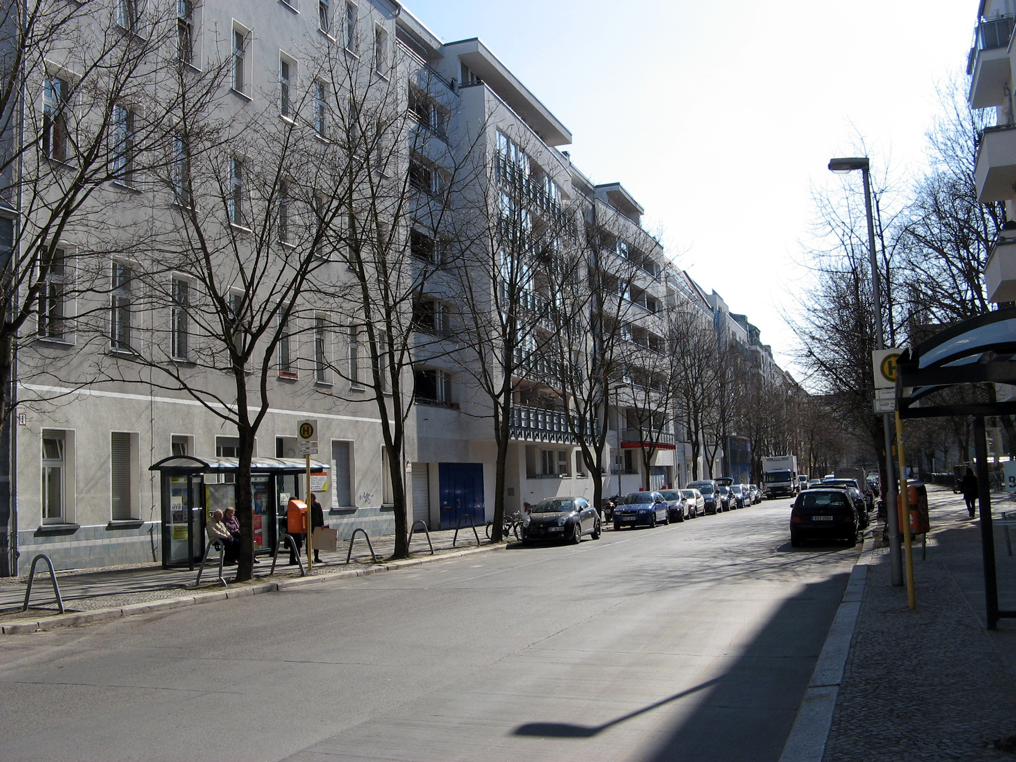 Kadiner Straße - Blick nach Süden zur Grünberger Straße. Auf der Ostseite sind alle kriegsbedingten Lücken inzwischen geschlossen worden. Alte Fabrikgebäude wie die Wollgarnfabrik in der Kadiner Straße 20 wurden kernsaniert. Es entstanden Lofts mit Terrassen und Balkonen.